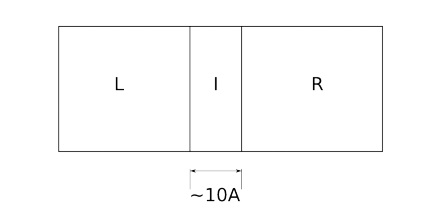 L ja R on ülijuhid, mis võivad olla tehtud samast materjalist või ka erinevast.